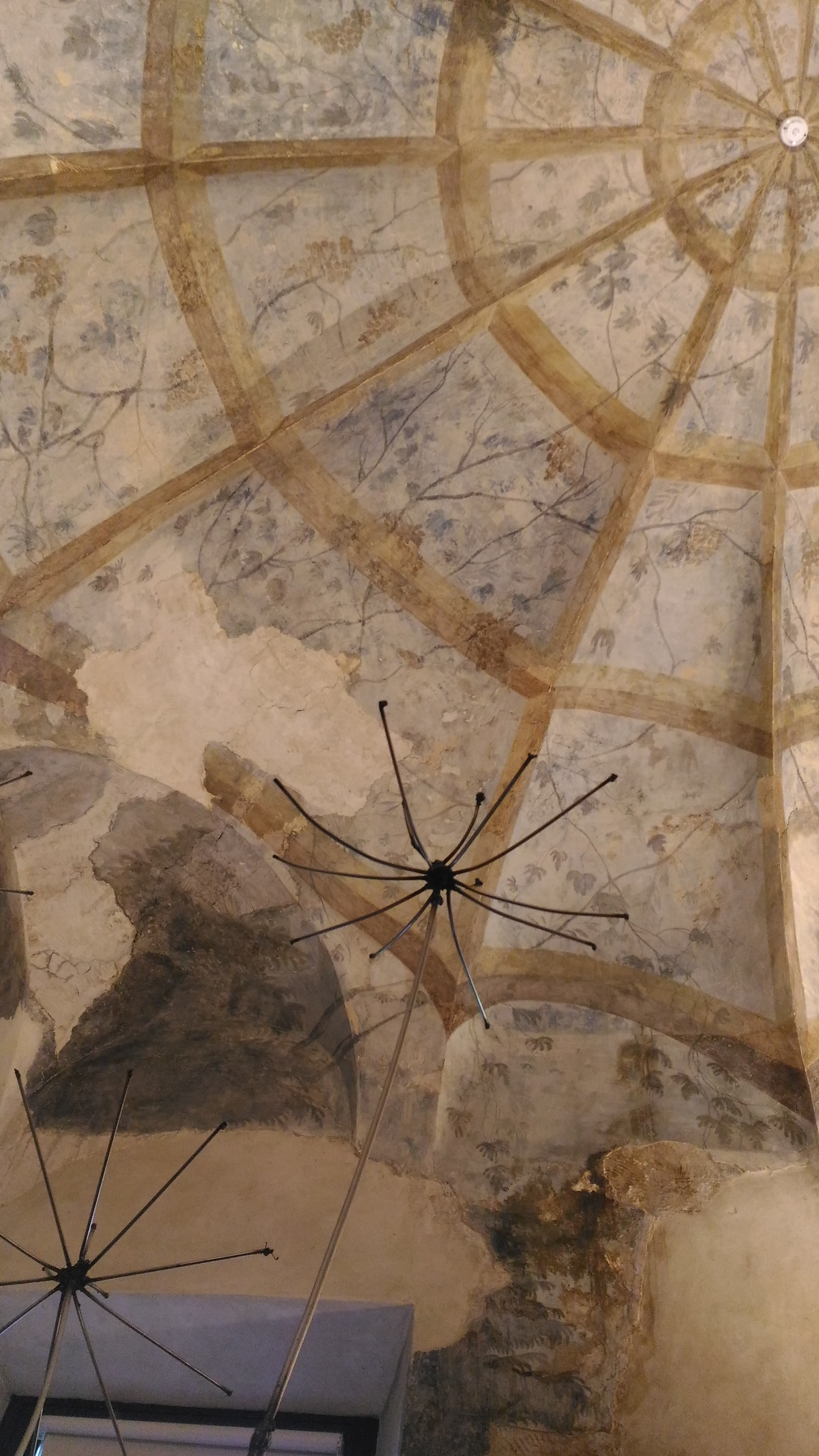 Palazzetto Eucherio Sanvitale